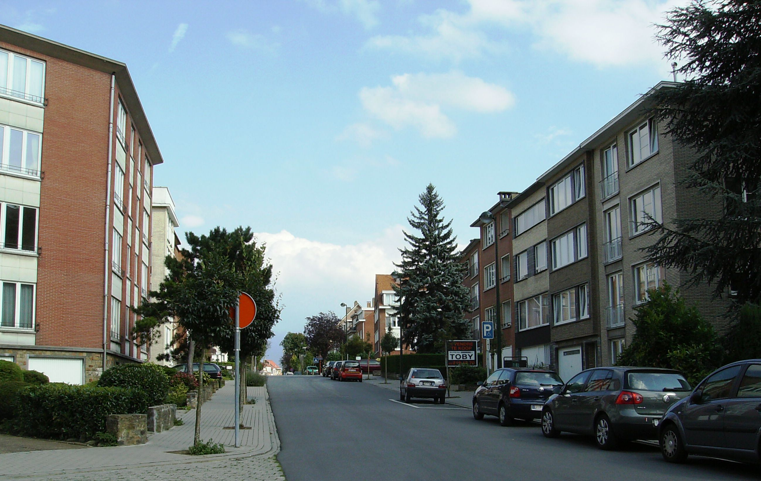 avenue Alphonse Valkeners Auderghem Belgium